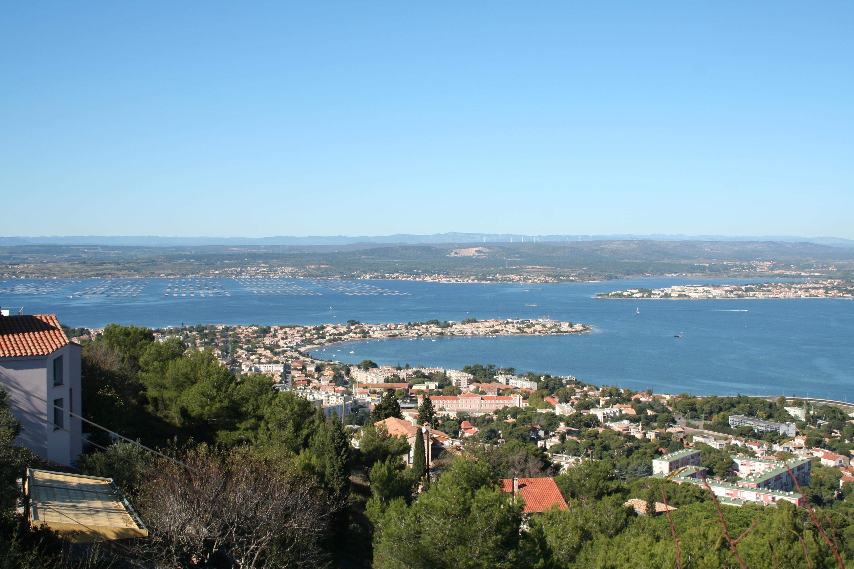 Sète (Hérault) - vue sur l'Étang de Thau depuis la colline de Saint-Clair. Remarquer les parc à huîtres de Bouzigues.